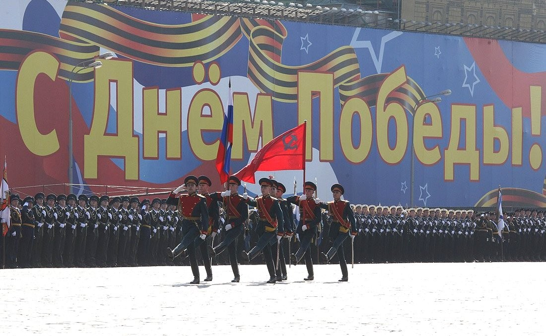 Военный парад, посвящённый 65-летию Победы в Великой Отечественной войне.